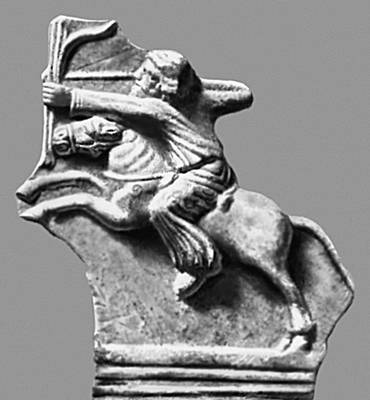 Парфянское царство. Рельеф из Месопотамии с изображением конного лучника. Терракота. Первые века н. э. Переднеазиатский музей. Берлин.